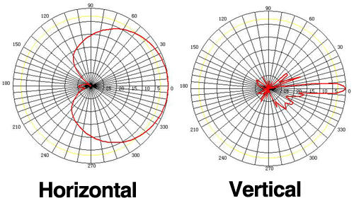 Diagrama antenas sectoriales